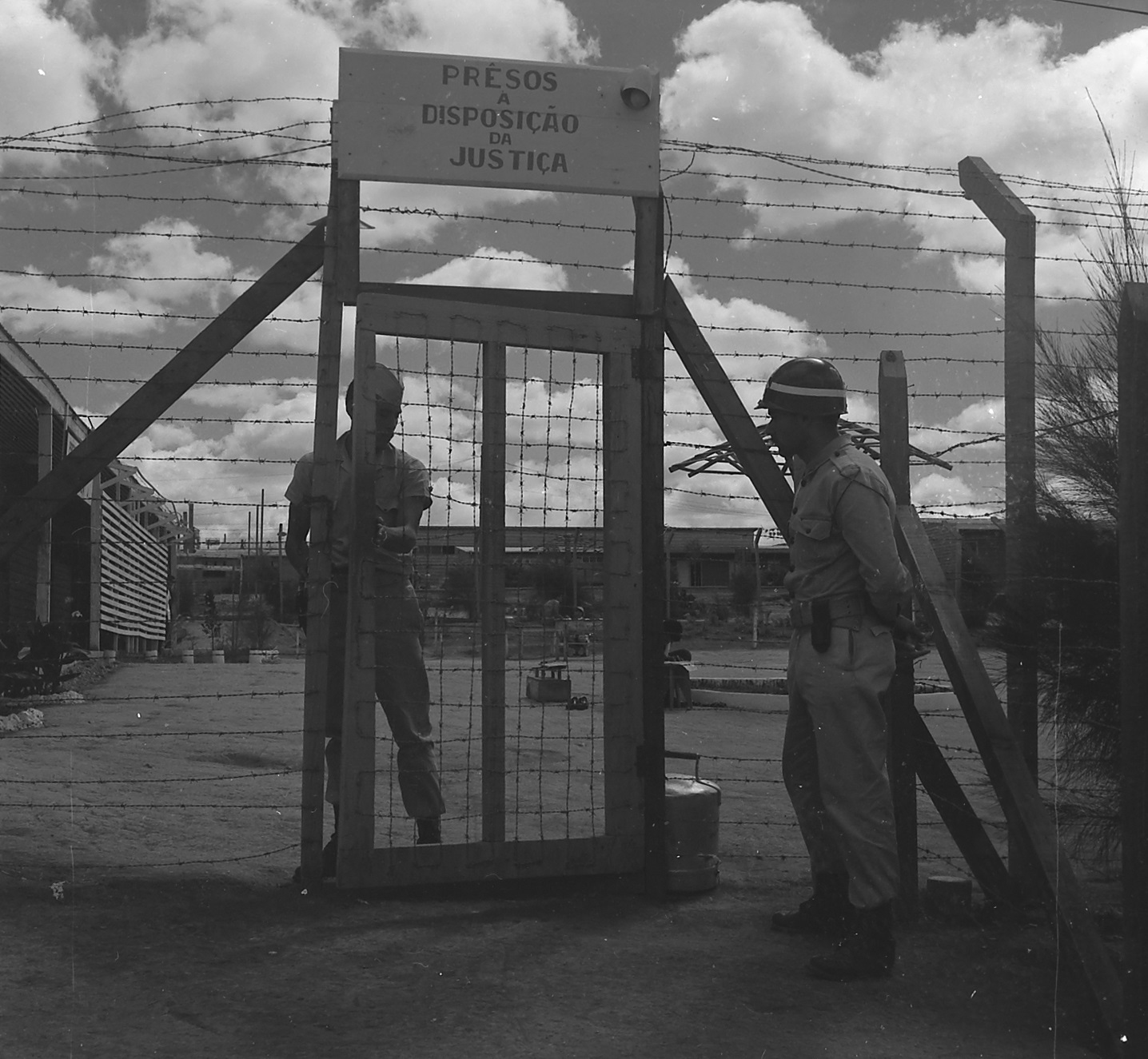 Imagem do Fundo Agência Nacional, do Arquivo Nacional